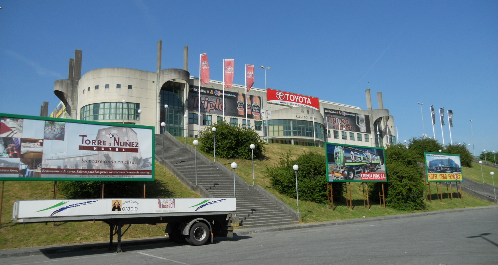 Fotografía do Pazo dos Deportes de Lugo.